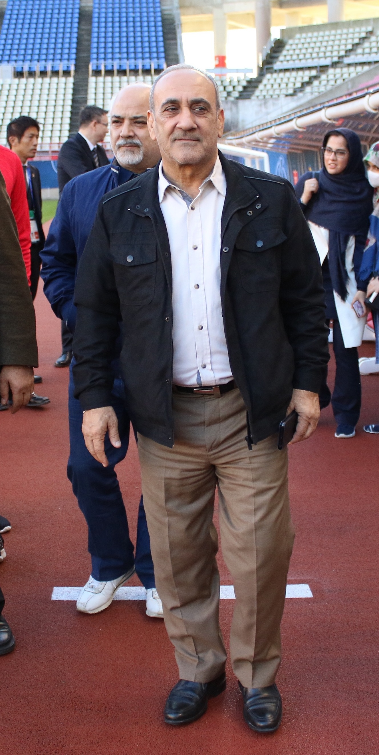 تمرین تیم فوتبال پرسپولیس، پیش از مسابقه نخست فینال لیگ قهرمانان آسیا ۲۰۱۸